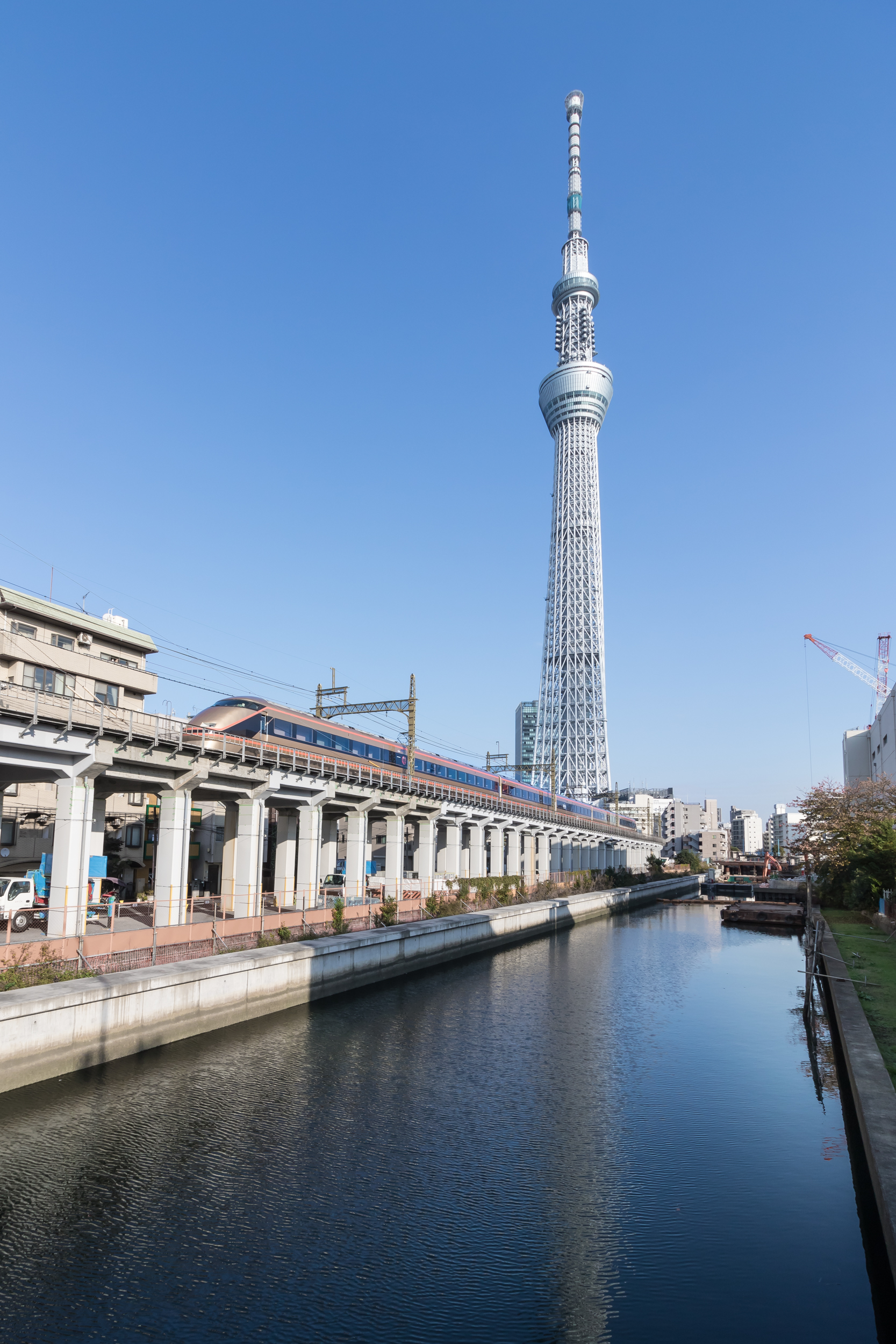 スカイツリーと東武鉄道100系電車106F（日光詣スペーシアカラー)。